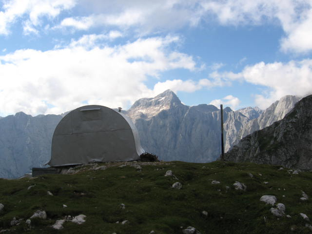 Bivak II. Pod Rokavi s Triglavom v ozadju